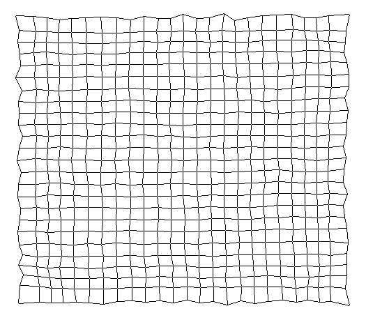 100000 Schritte